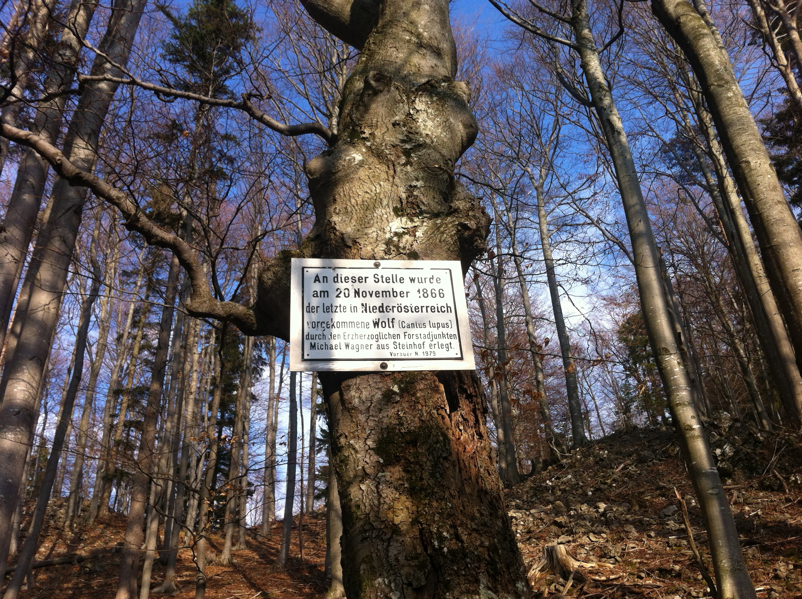 Jene Stelle, an der am 20. November 1866 der letzte Wolf Niederösterreichs durch den Erzherzoglichen Forstadjunkten Michael Wagner erlegt wurde.